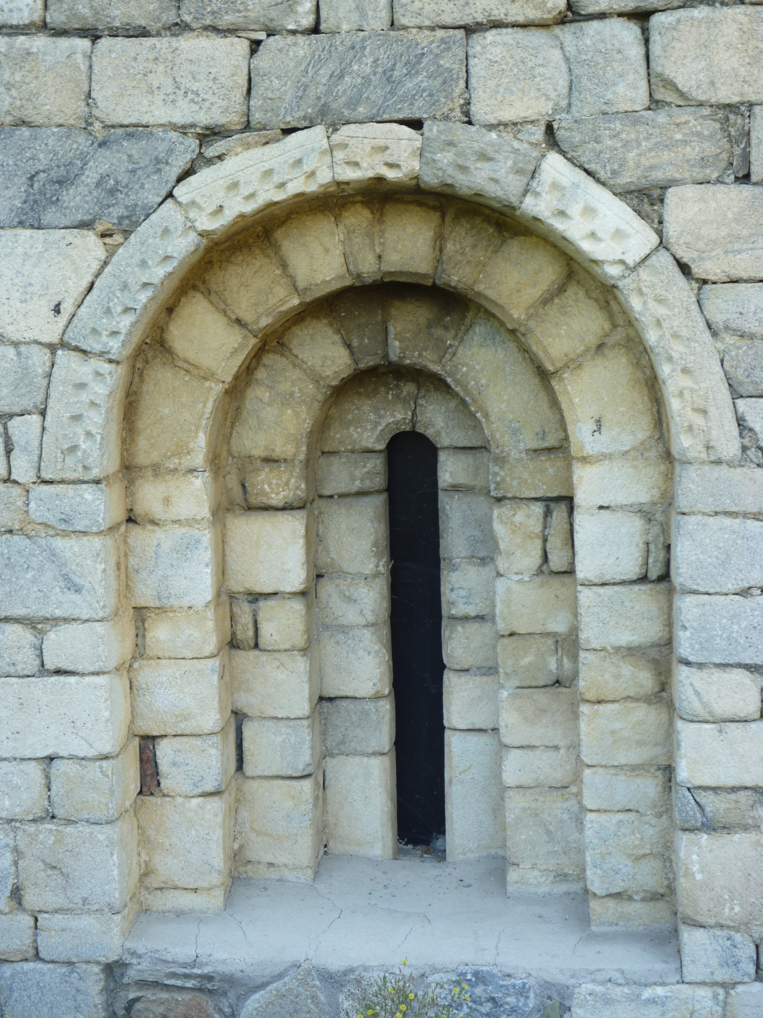 Església de Sant Joan d'Arties (Naut Aran): detall d'una finestra